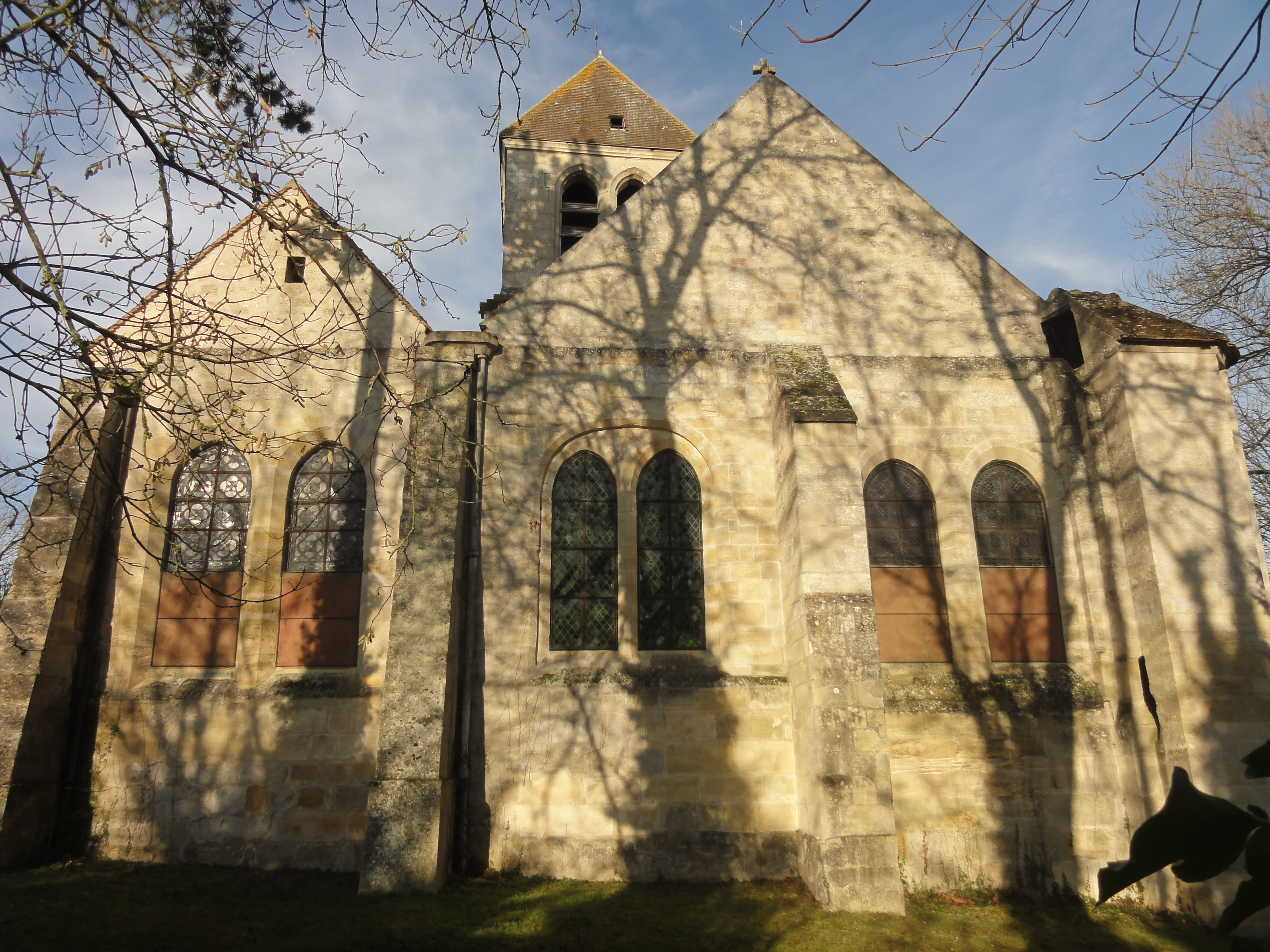 Chevet, vue depuis l'est.